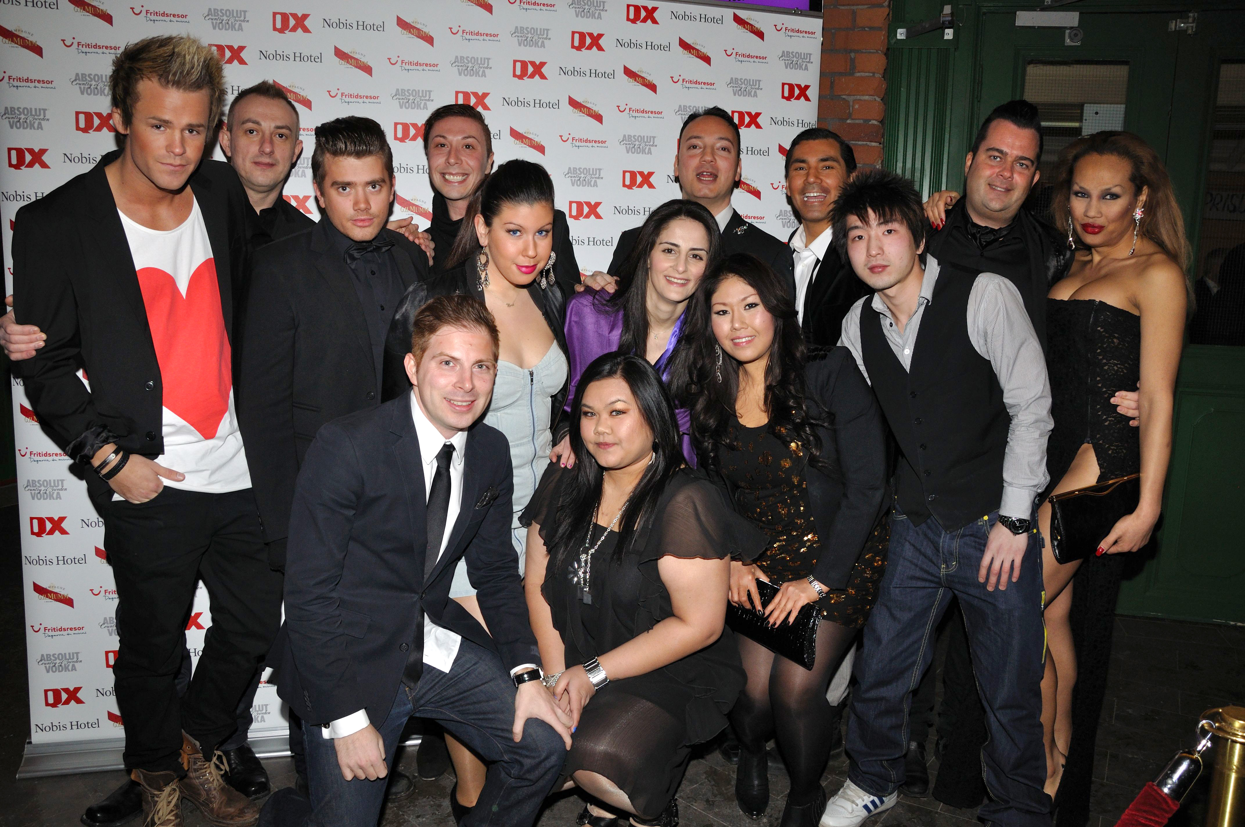 Gaygalan 2011 personalen på Gretas krog var på Gaygalan